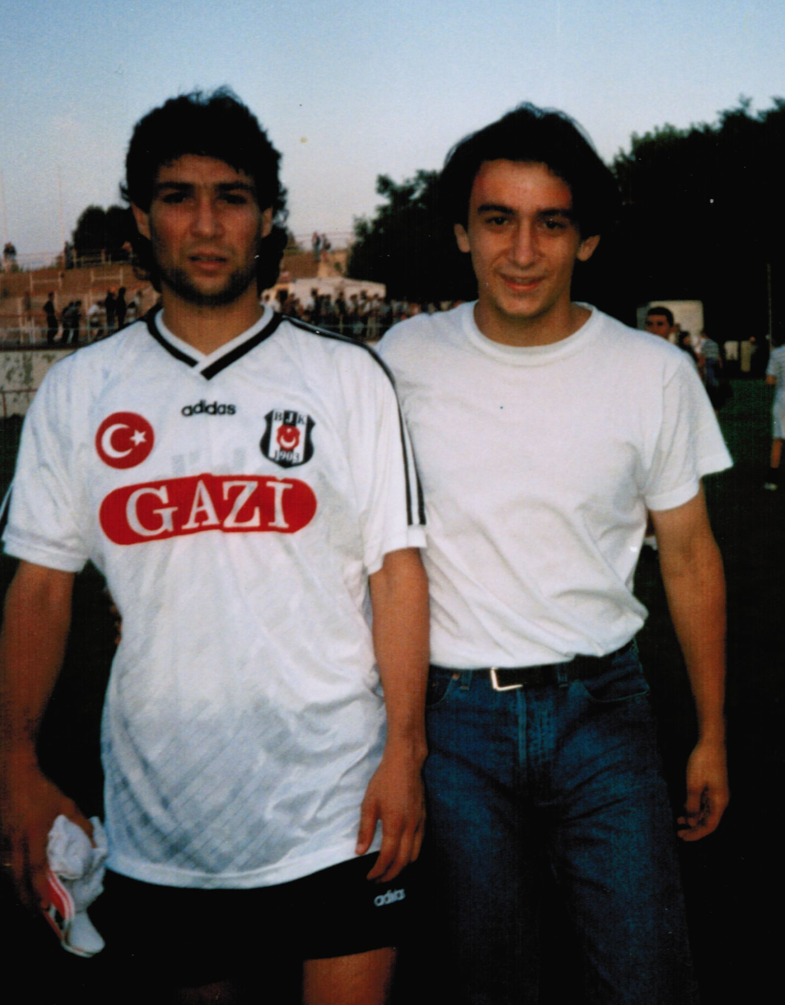 Während eines Freundschaftspiels zwischen Besiktas und Türkiyemspor vor der Saison 1995-96. Links Orhan Kaynak, Rechts Xberger